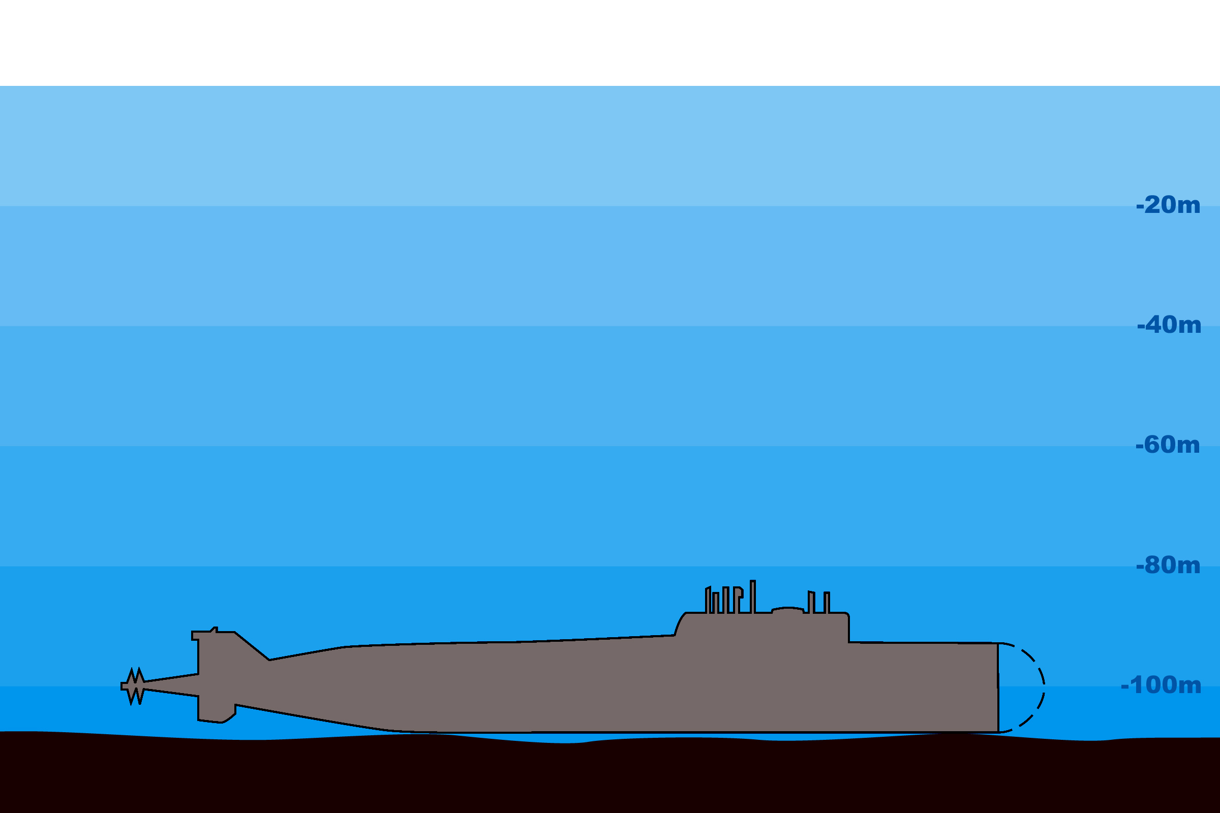 Die Kursk in 108m Tiefe